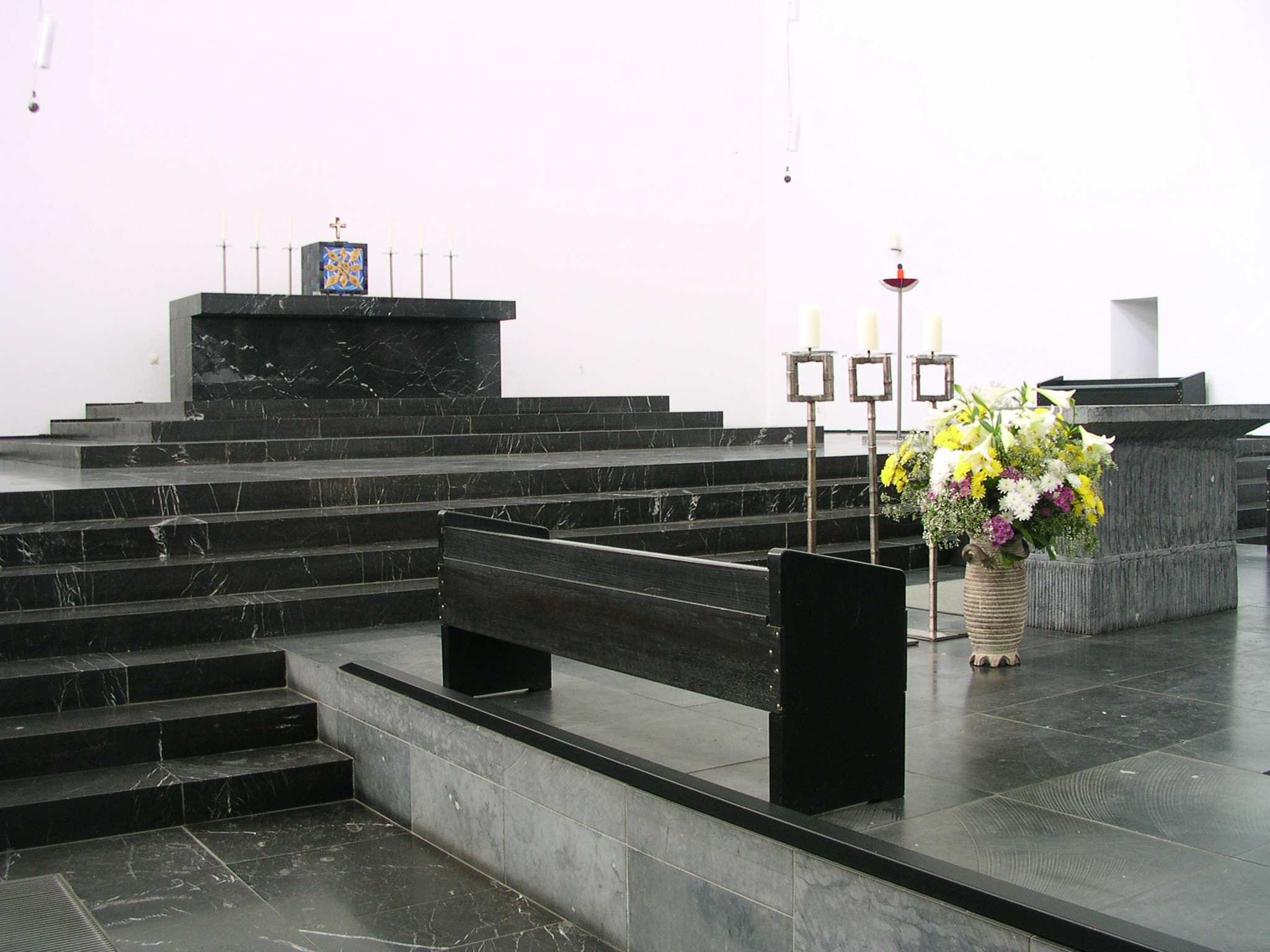 Aachen, Fronleichnamskirche, Chor